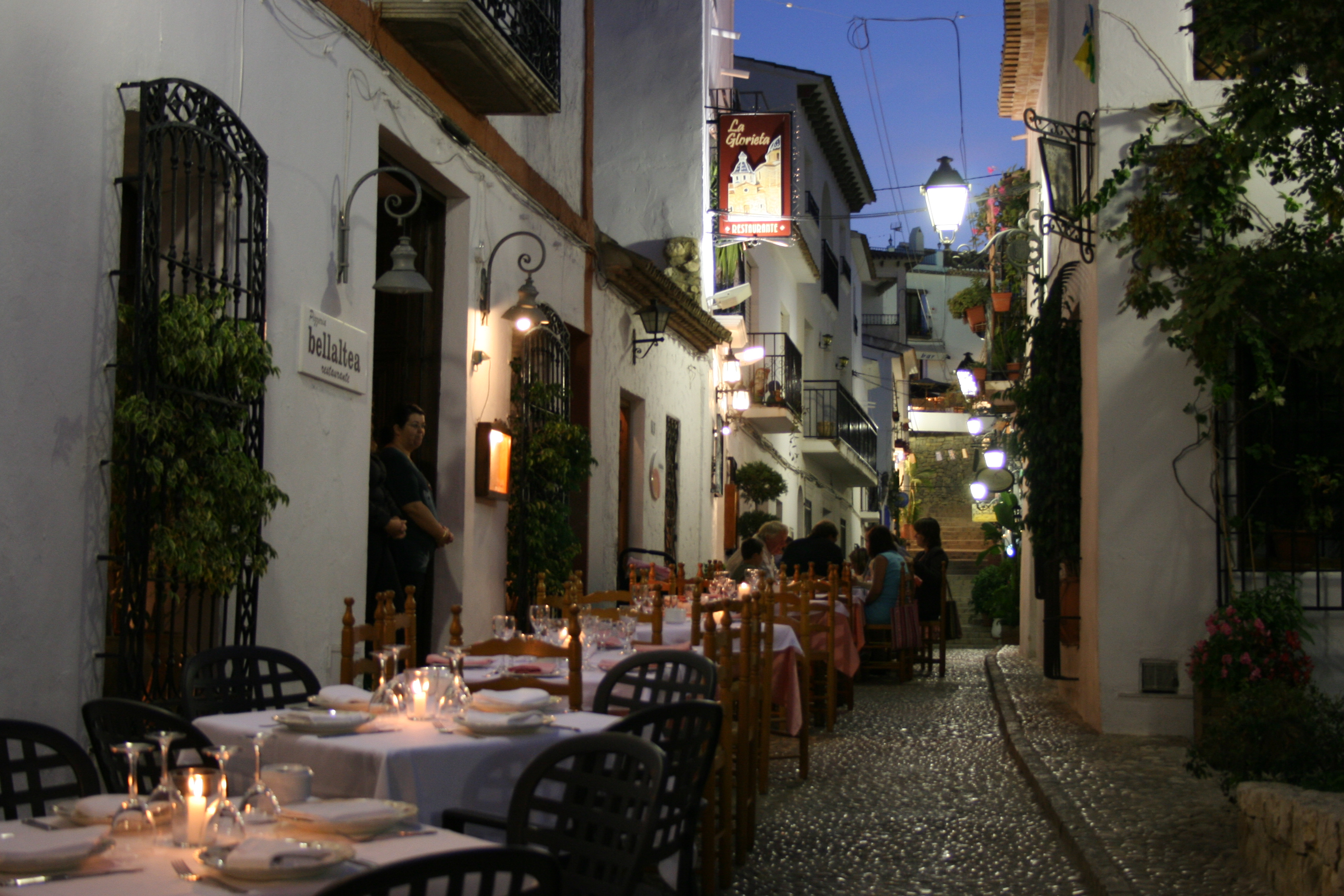 Vista nocturna de una calle típica del casto antiguo de Altea, Alicante, donde los restaurantes ofrecen sus veladores para cenar en un ambiente relajante.